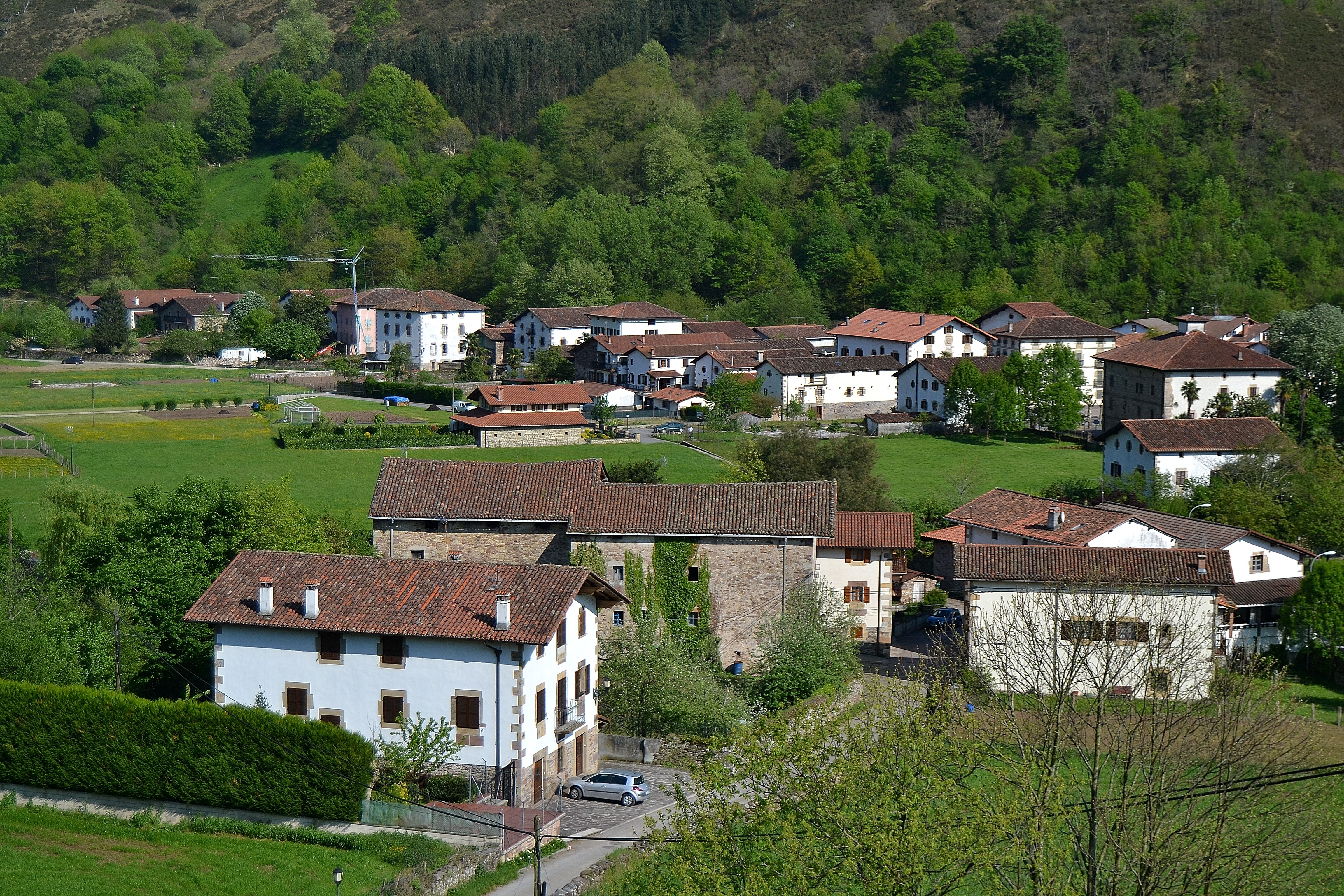 Ituren udalerriko herrigunea. Malerreka, Nafarroa. Euskal Herria. Bourgh of Ituren village. Malerreka, Navarre. Basque Country.